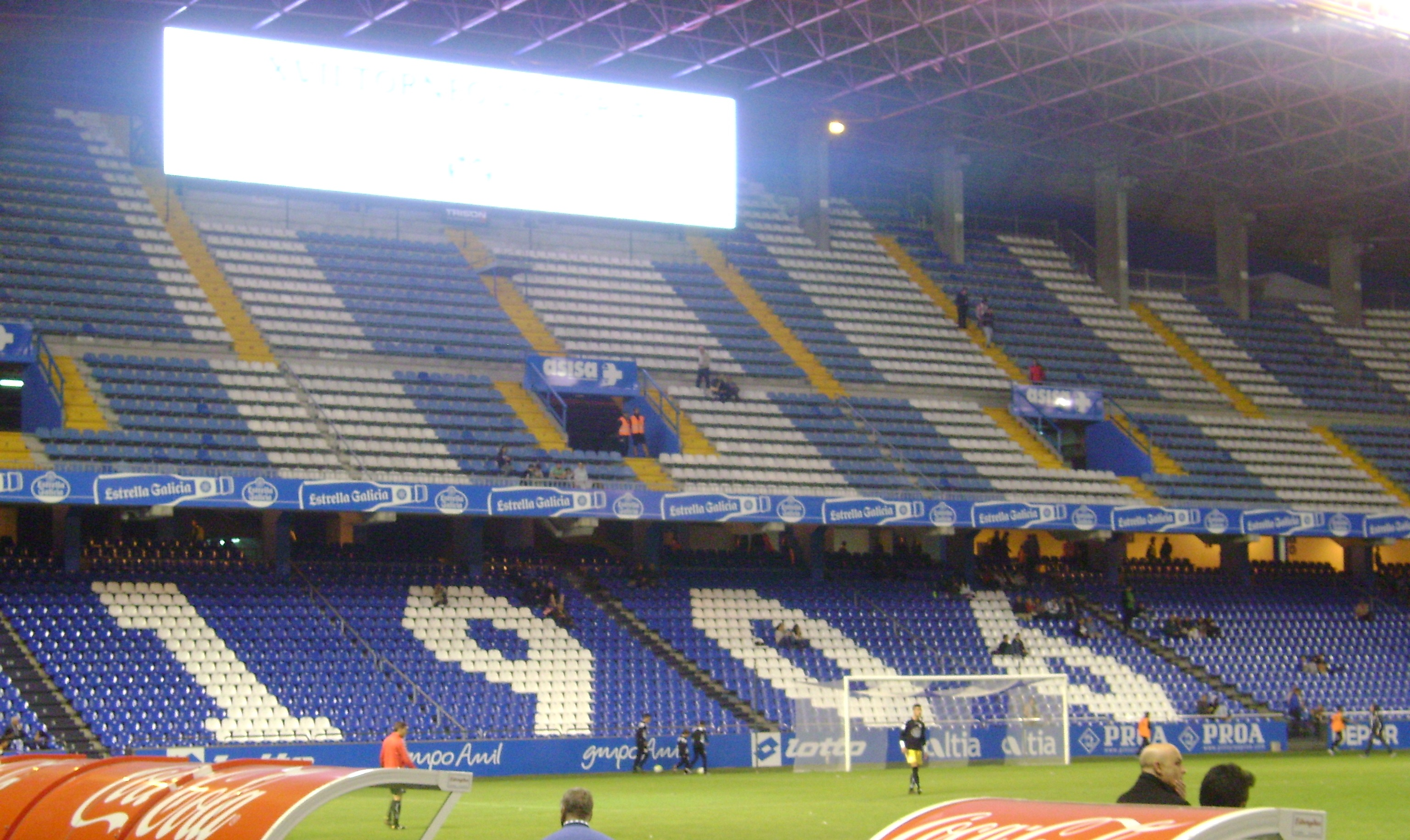 Grada de Riazor 1906